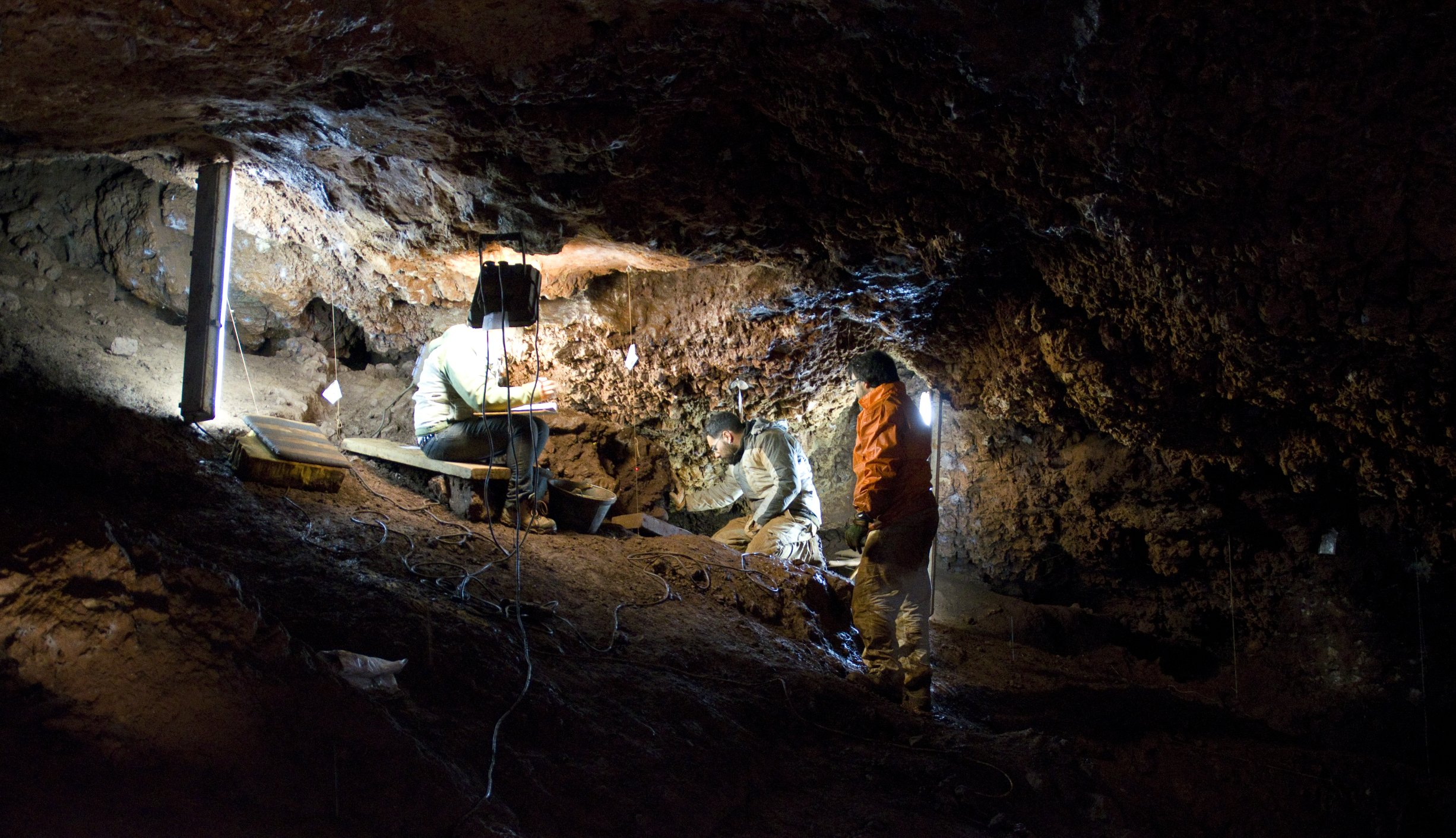 Esta cueva está en la ciudad de Cáceres y está siendo excavada por el equipo Primeros Pobladores de Extremadura (EPPEX). Según la datación C14 de algunos carbones, esta cueva fue ocupada hace más de 8000 años.